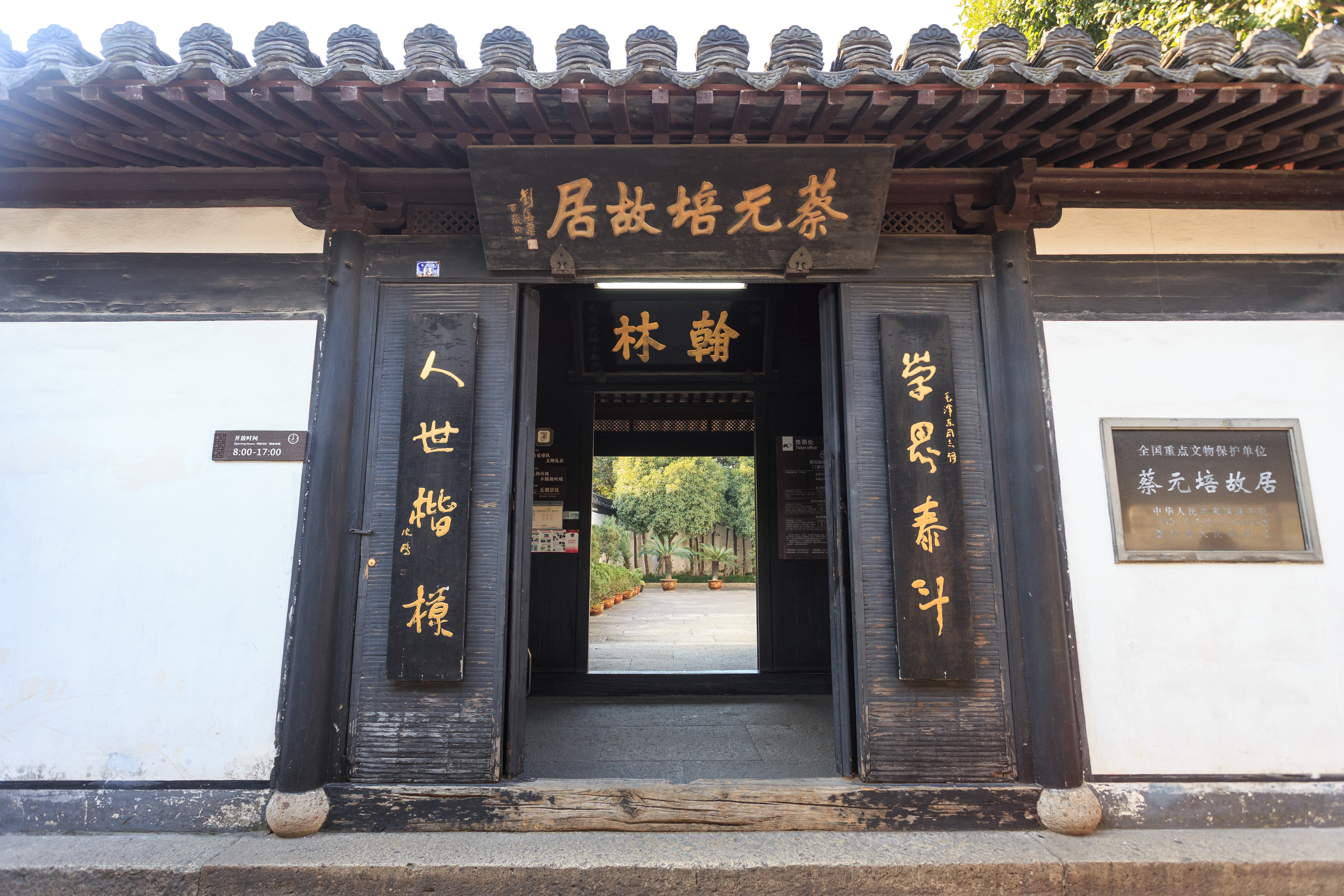 绍兴蔡元培故居 门厅